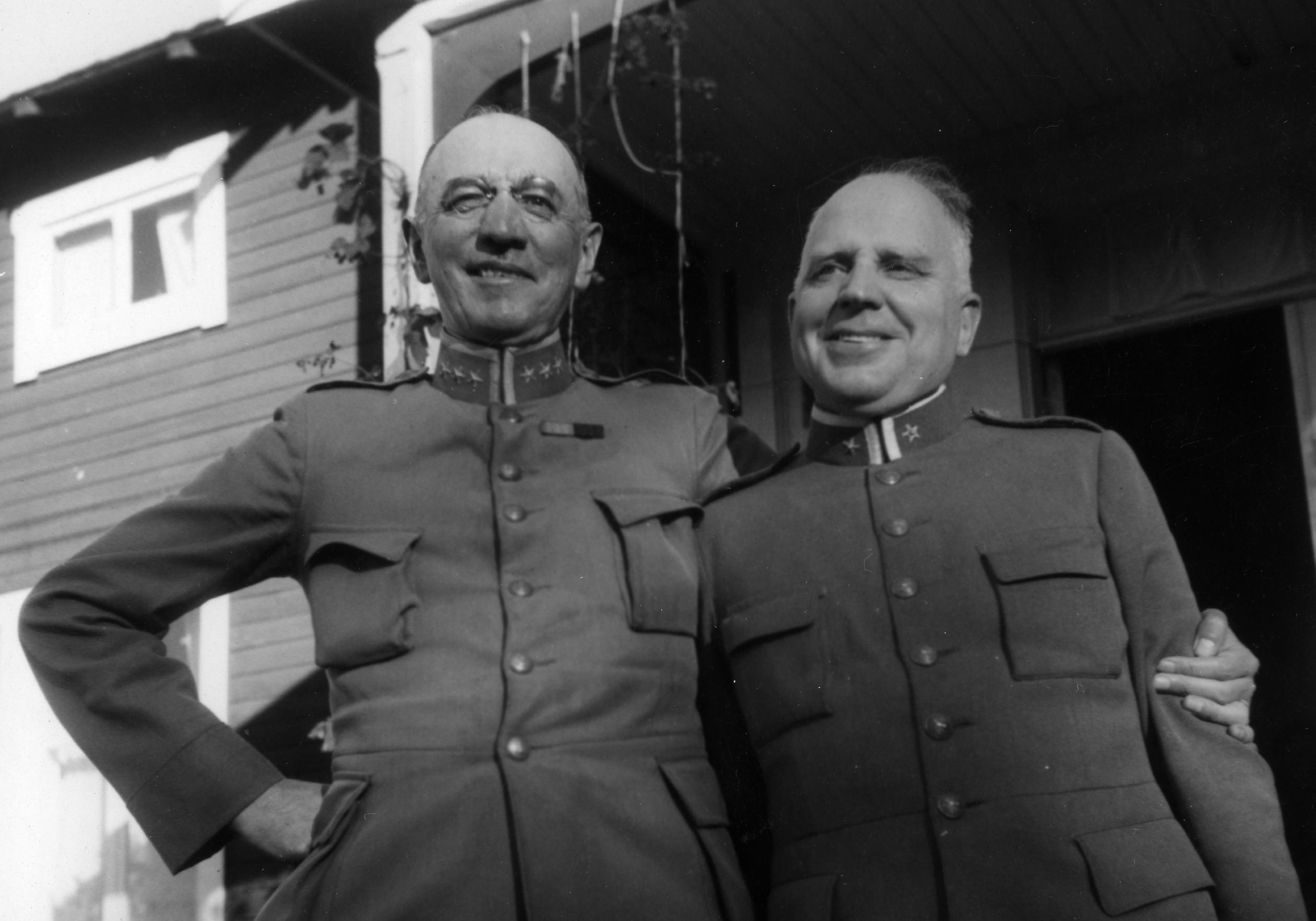 Alf Meyerhöffer, riksdagsman och militär till vänster; Birger Steckzén, militär, till höger. Bild tagen 1930 (enligt stadsarkivet).